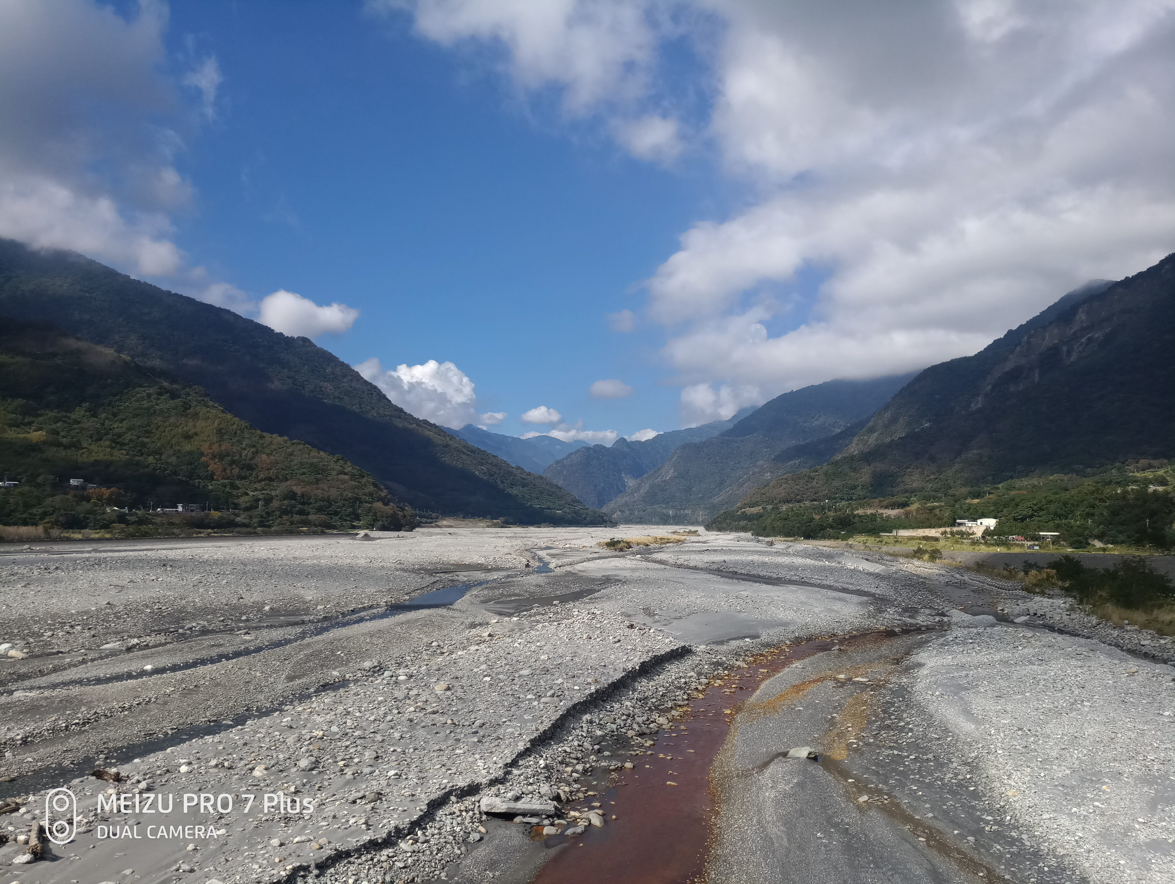 臺灣臺東縣海端鄉新武呂溪，自初來橋向源頭拍攝。